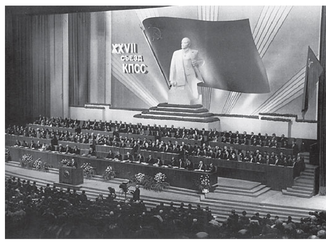 SESBeko Alderdi Komunistaren kongresua